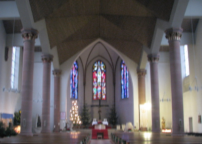 Dreifaltigkeitskirche Ludwigshafen.